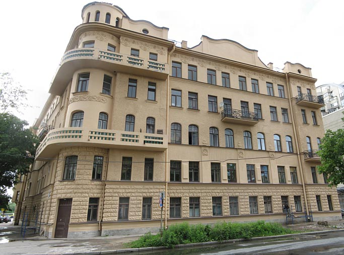 Доходный дом П. И. Поршневой. Санкт-Петербург, набережная Черной речки, д. 49 / Старобельская ул., 2х. Архитектор Цейль М. А., 1906